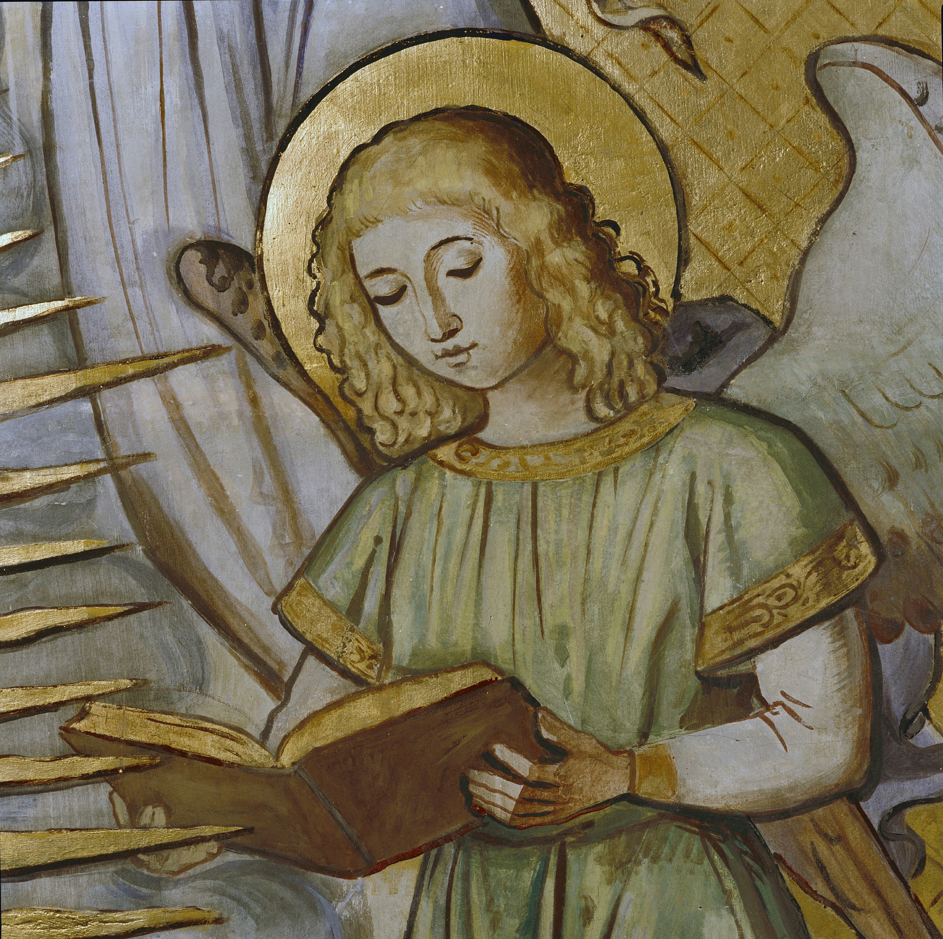 Kapel In Het Zand: INTERIEUR, MUURSCHILDERINGEN, DETAIL (NA RESTAURATIE)